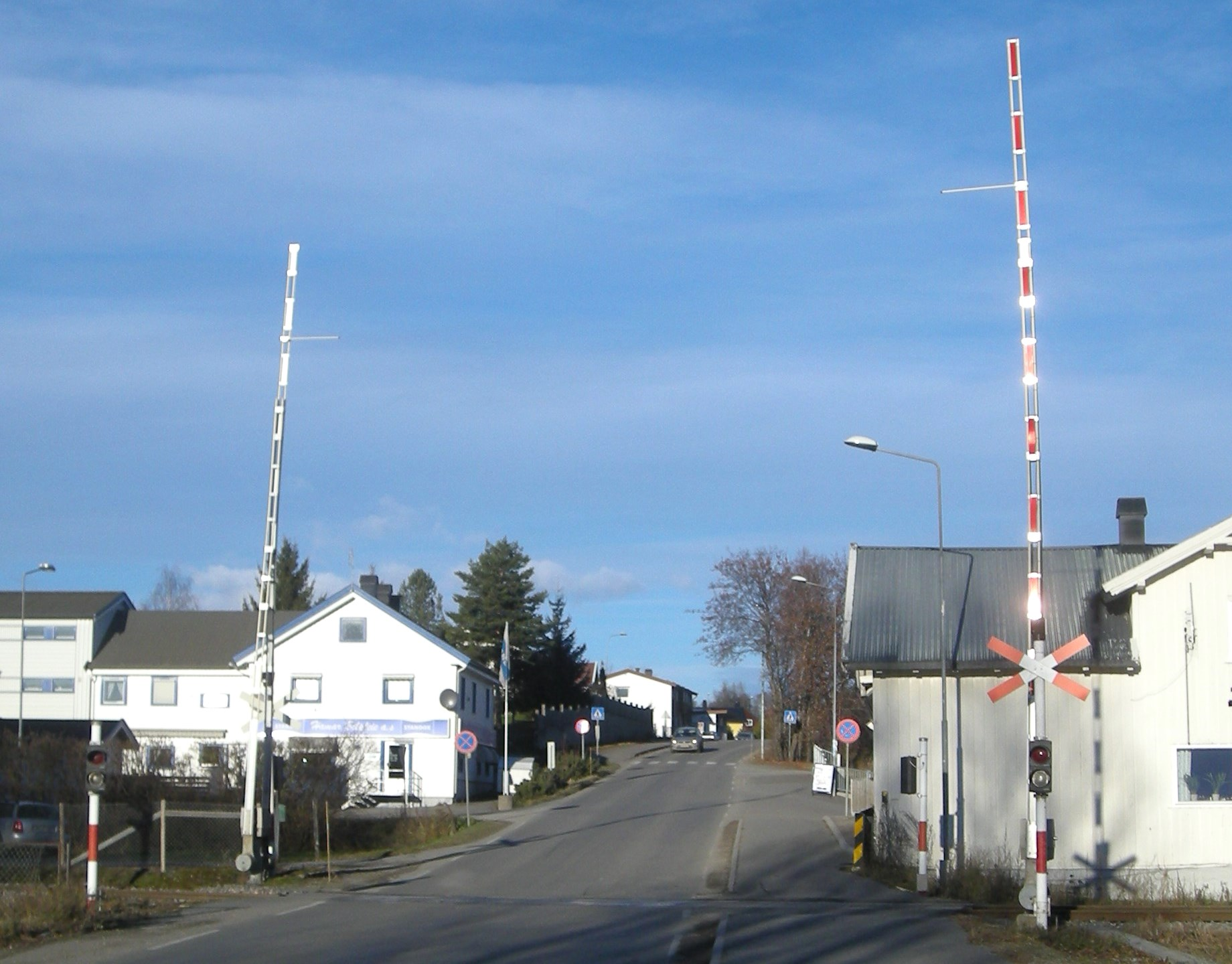 Fylkesvei 1812 (tidl. 117) krysser Rørosbanen på Hjellum.